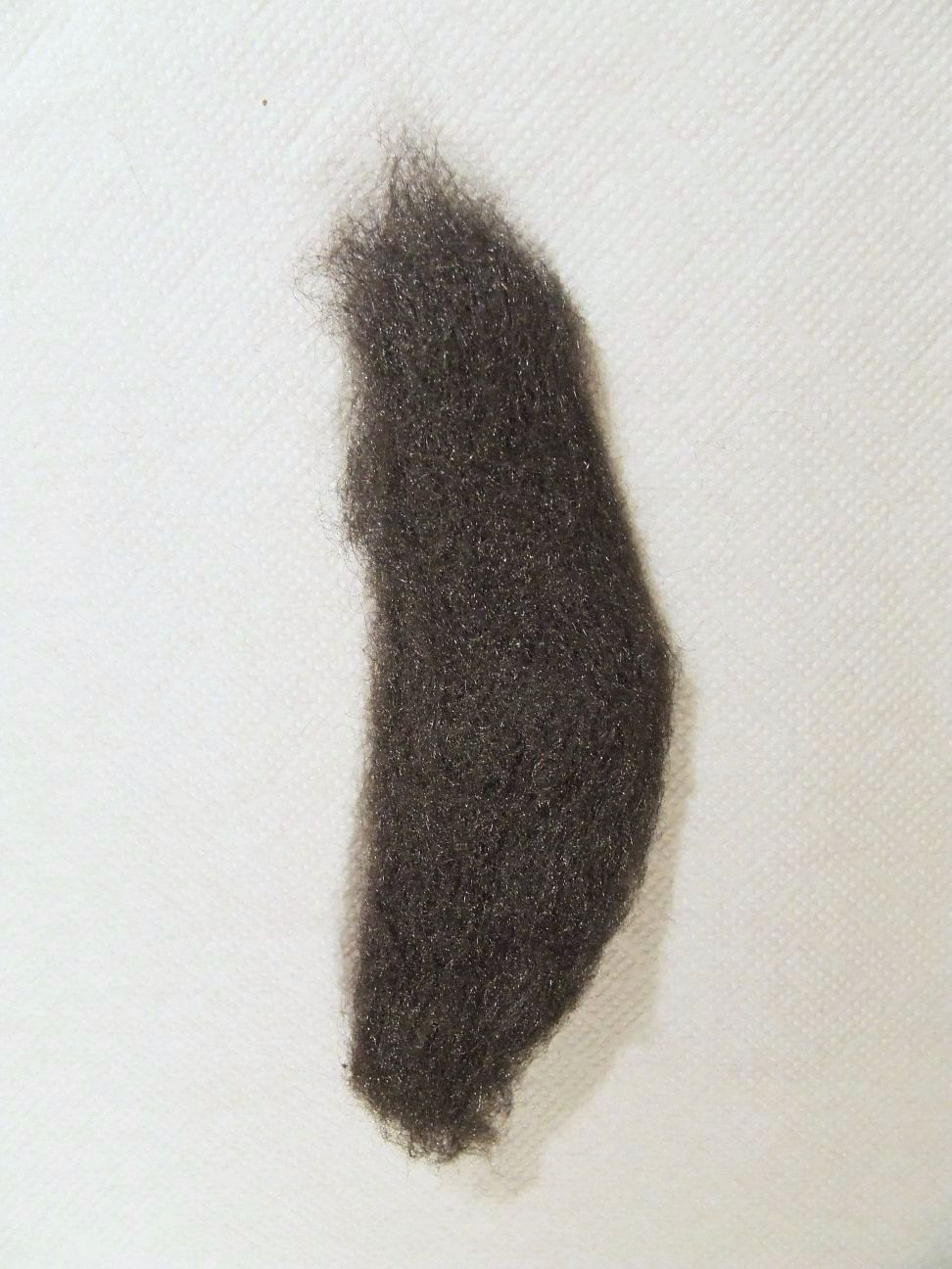 Steel wool / Stahlwolle. Foto von: User:Neitram, Februar 2007.